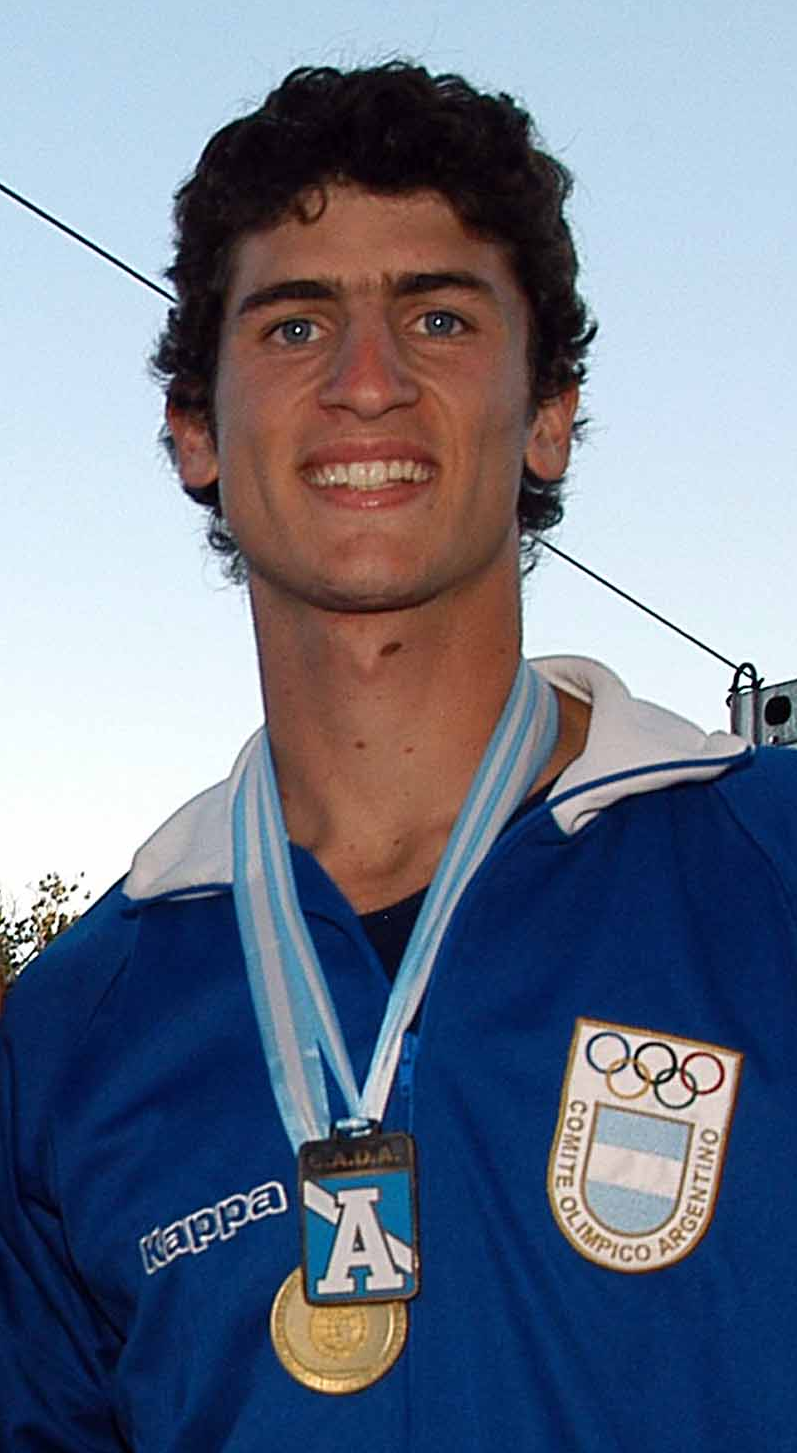 Imagen de los hermanos Germán y Guillermo Chiaraviglio recibiendo sus medallas tras finalizar primero y segundo puesto respectivamente en la prueba de Salto con pértiga en los Juegos Suramericanos Buenos Aires 2006.